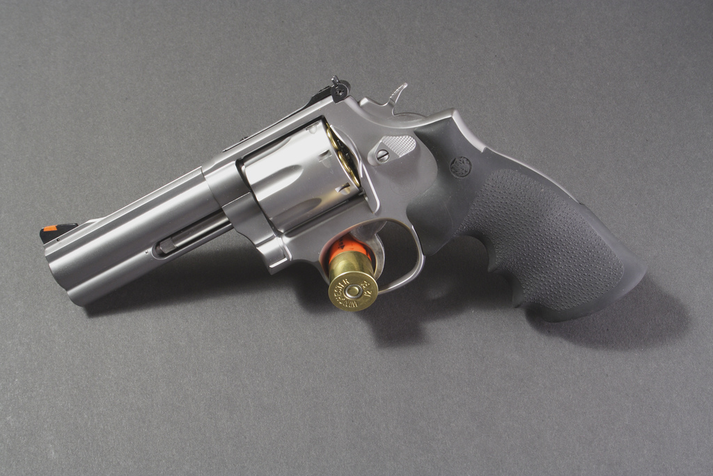 S&W 686+ 2